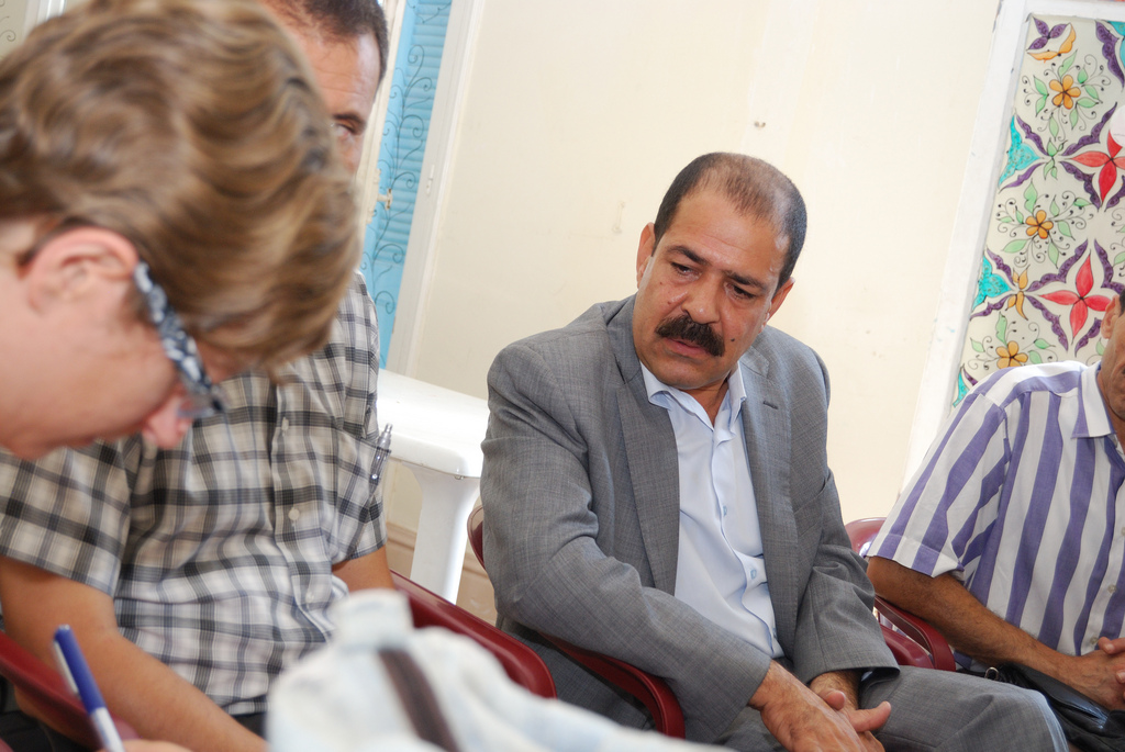 Chokri Belaid von der Mouvement des Patriotes Démocrates (MPD) in dem Büro der Bewegung in Tunis.